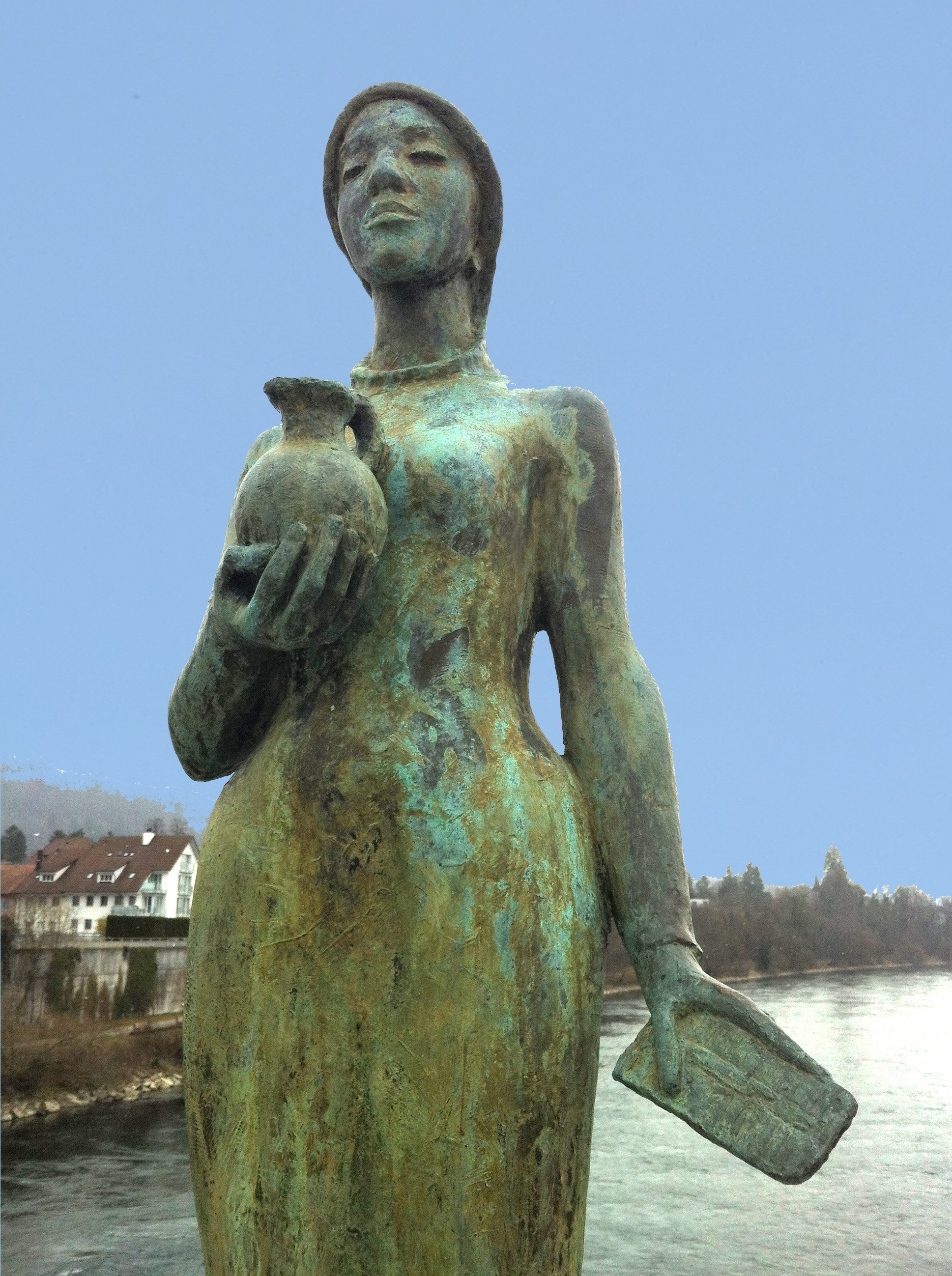 Verena mit Kamm und Krug, auf der Rheinbrücke Zurzach–Rheinheim. 1979 vom Bildhauer Ernst Suter (1904–1987) geschaffen.